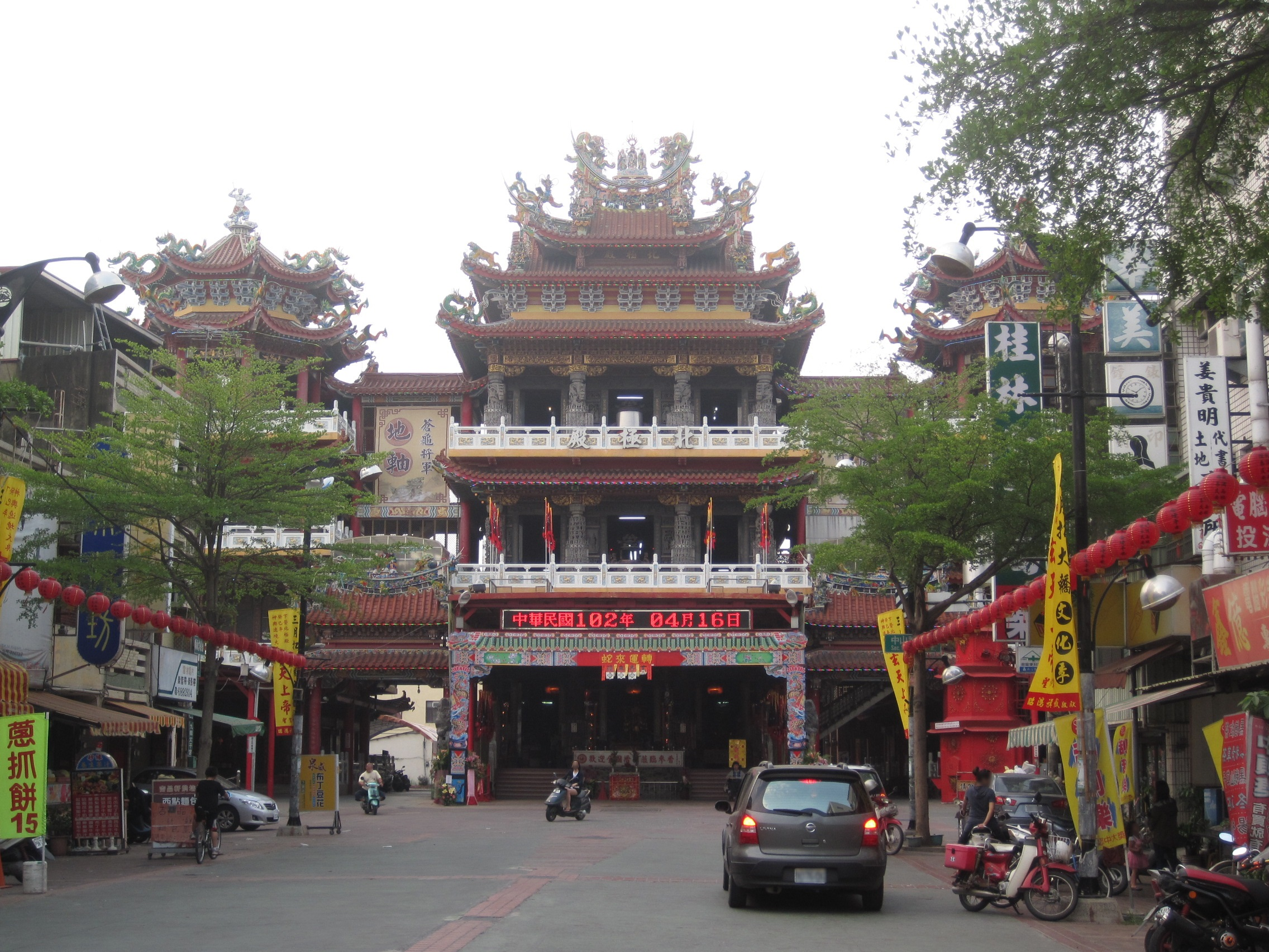 下營北極殿